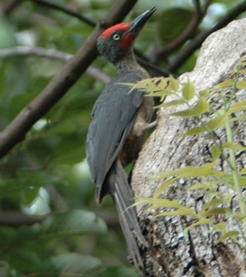 Tangkoko, Sulawesi, August 2008